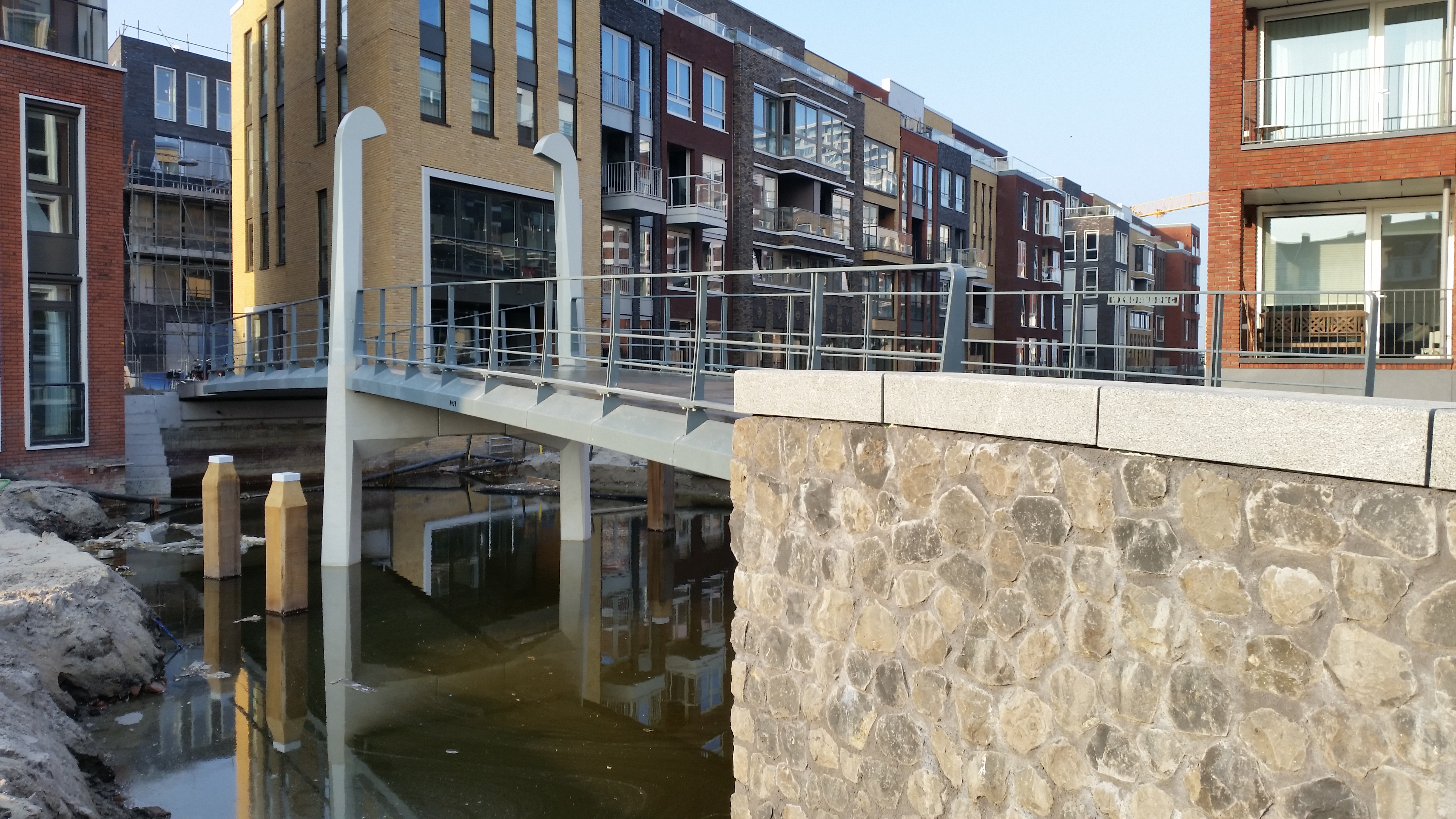 Zijaanzicht van de Windaubrug